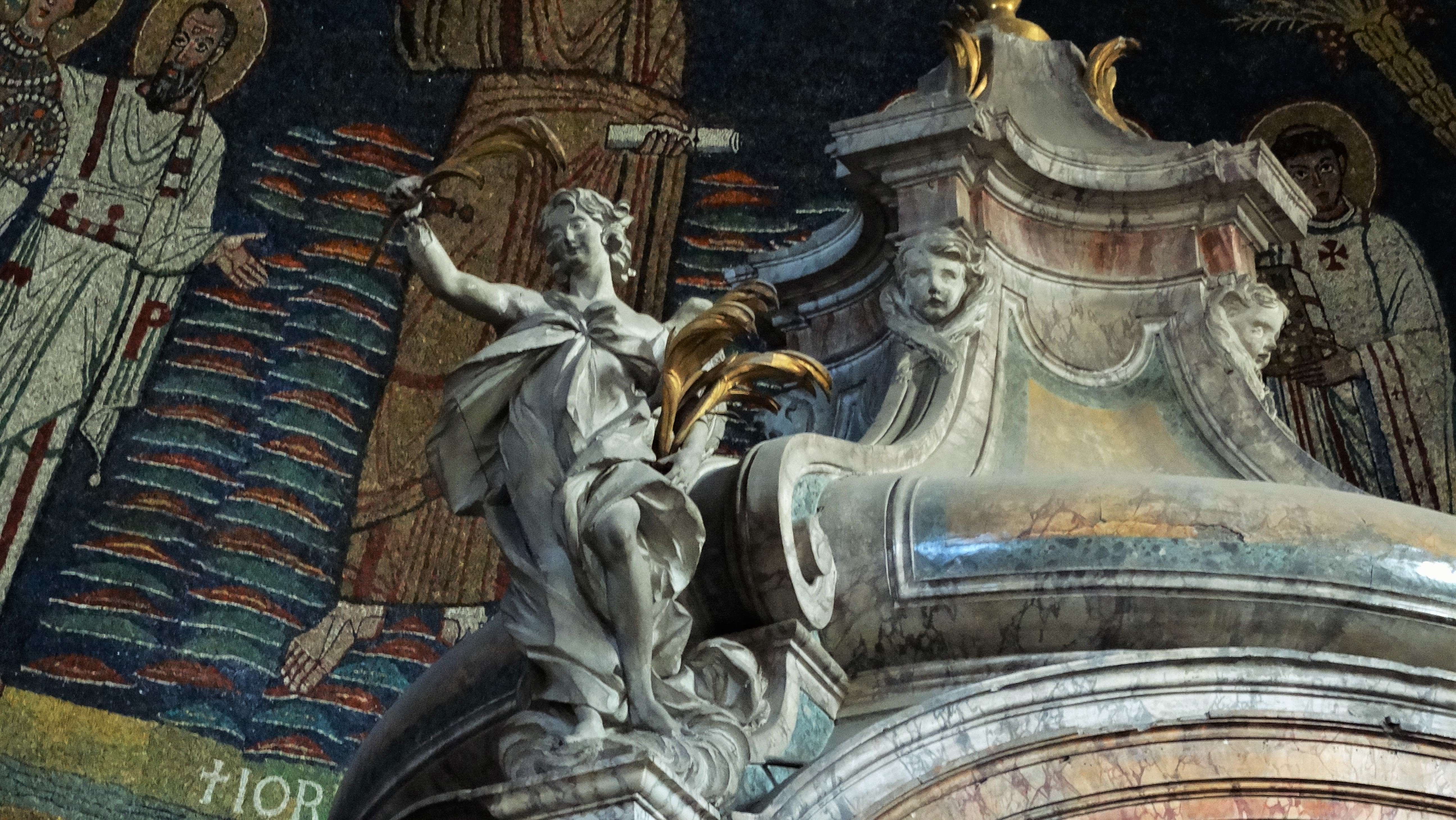 Ciborio, angeli in stucco di Giuseppe Rusconi